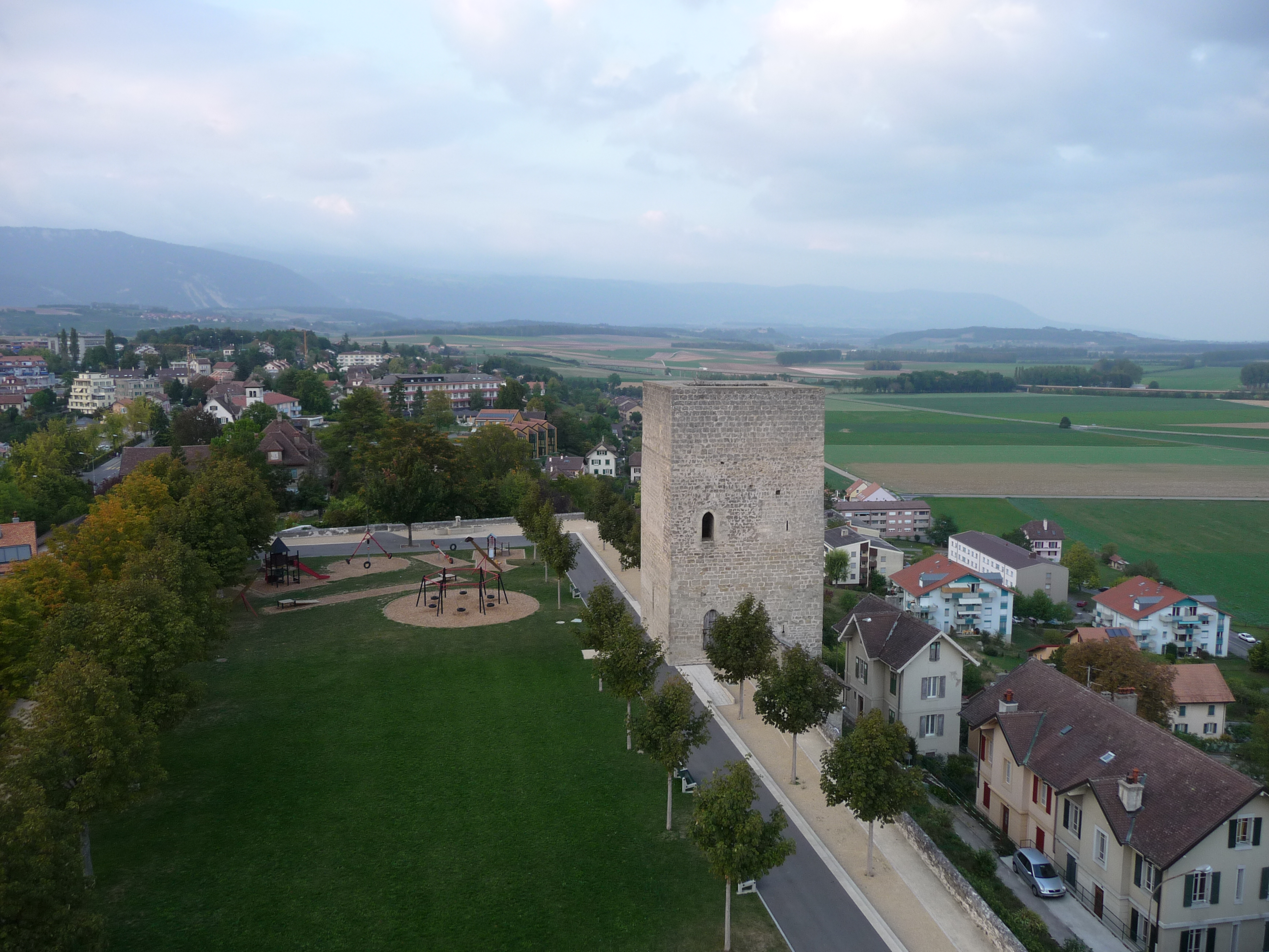 Orbe.